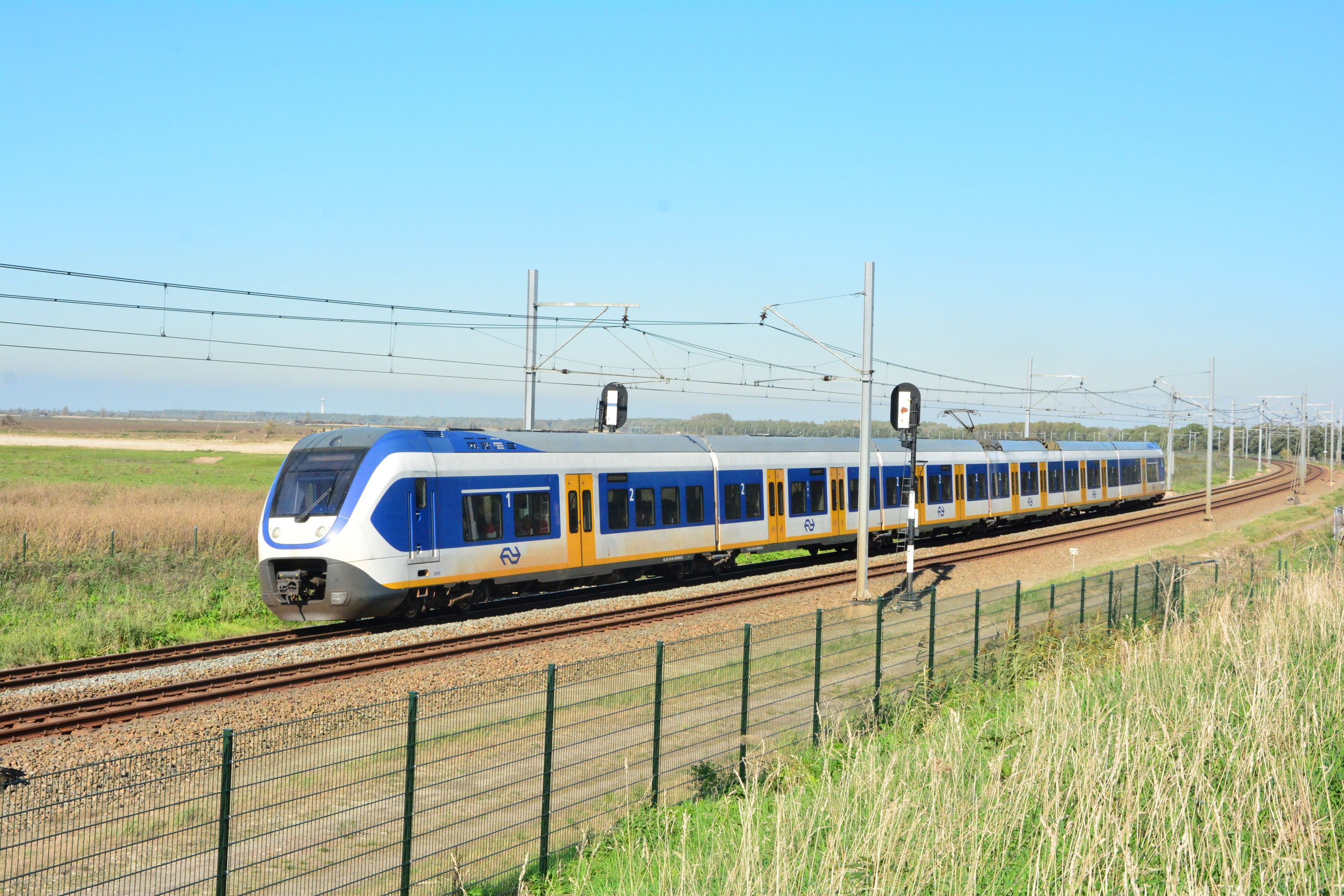 SLT 2640 met sprinter 14652 Zwolle – Amsterdam Centraal